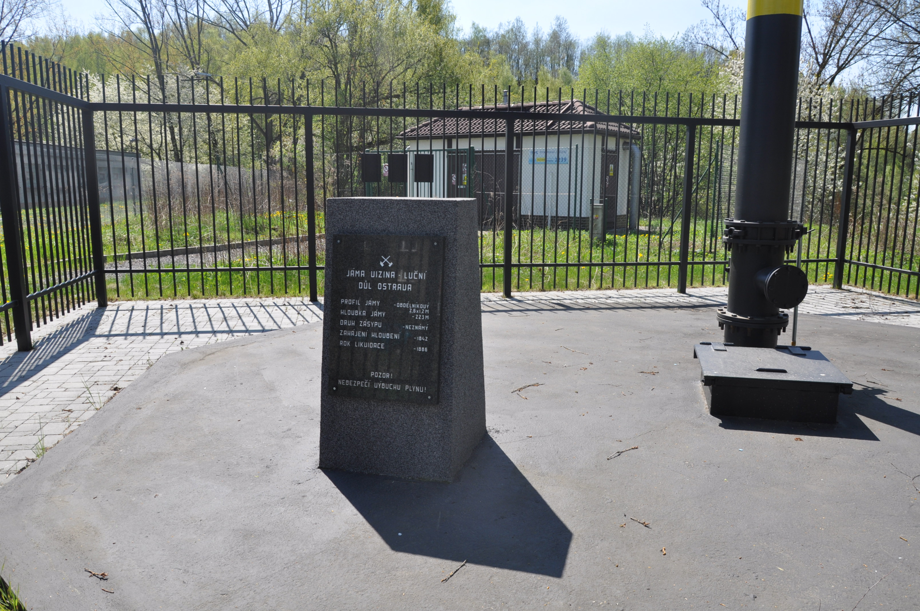 Luční jáma, Slezská Ostrava, informační deska